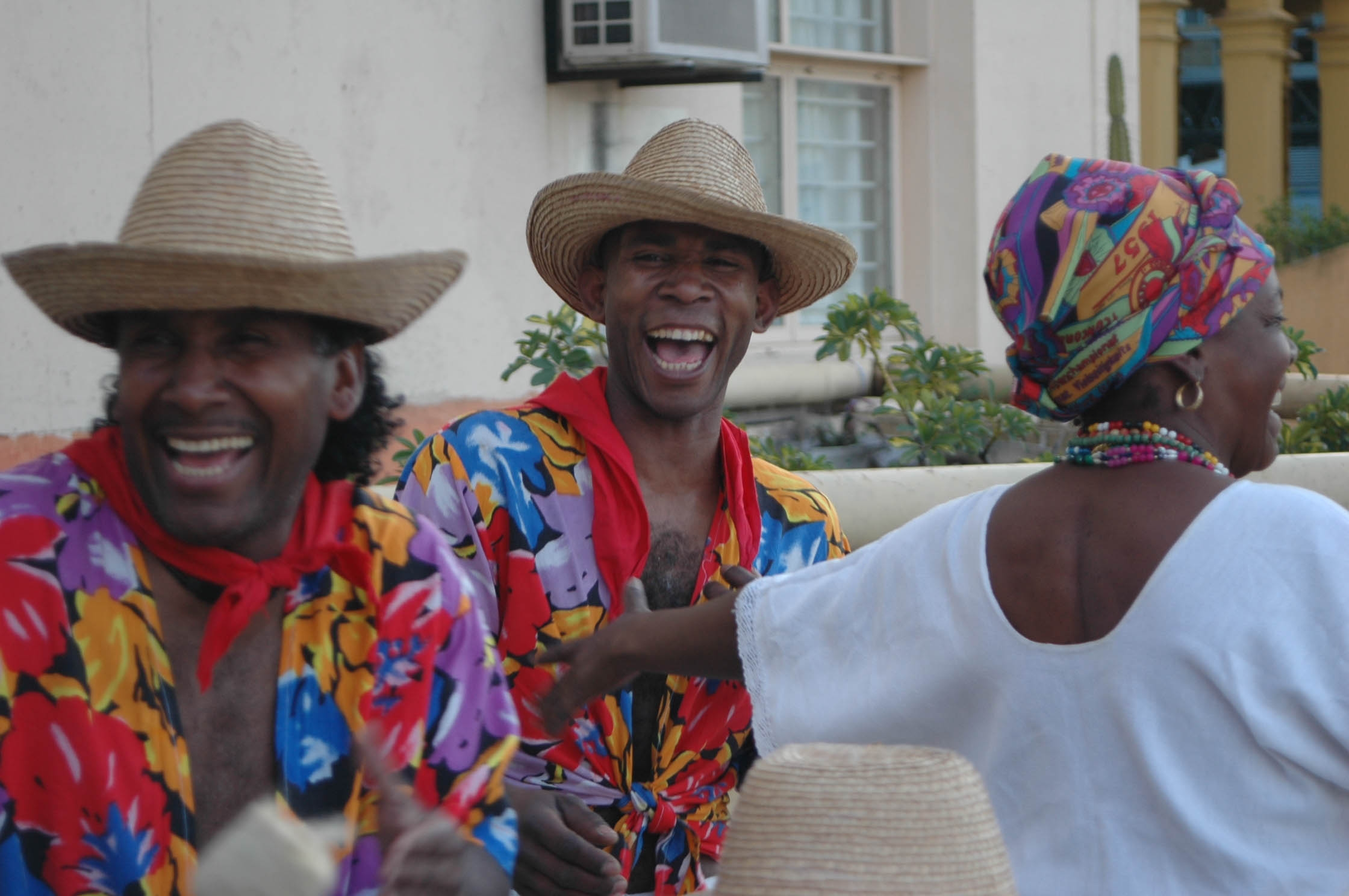 Cabo Verde 01